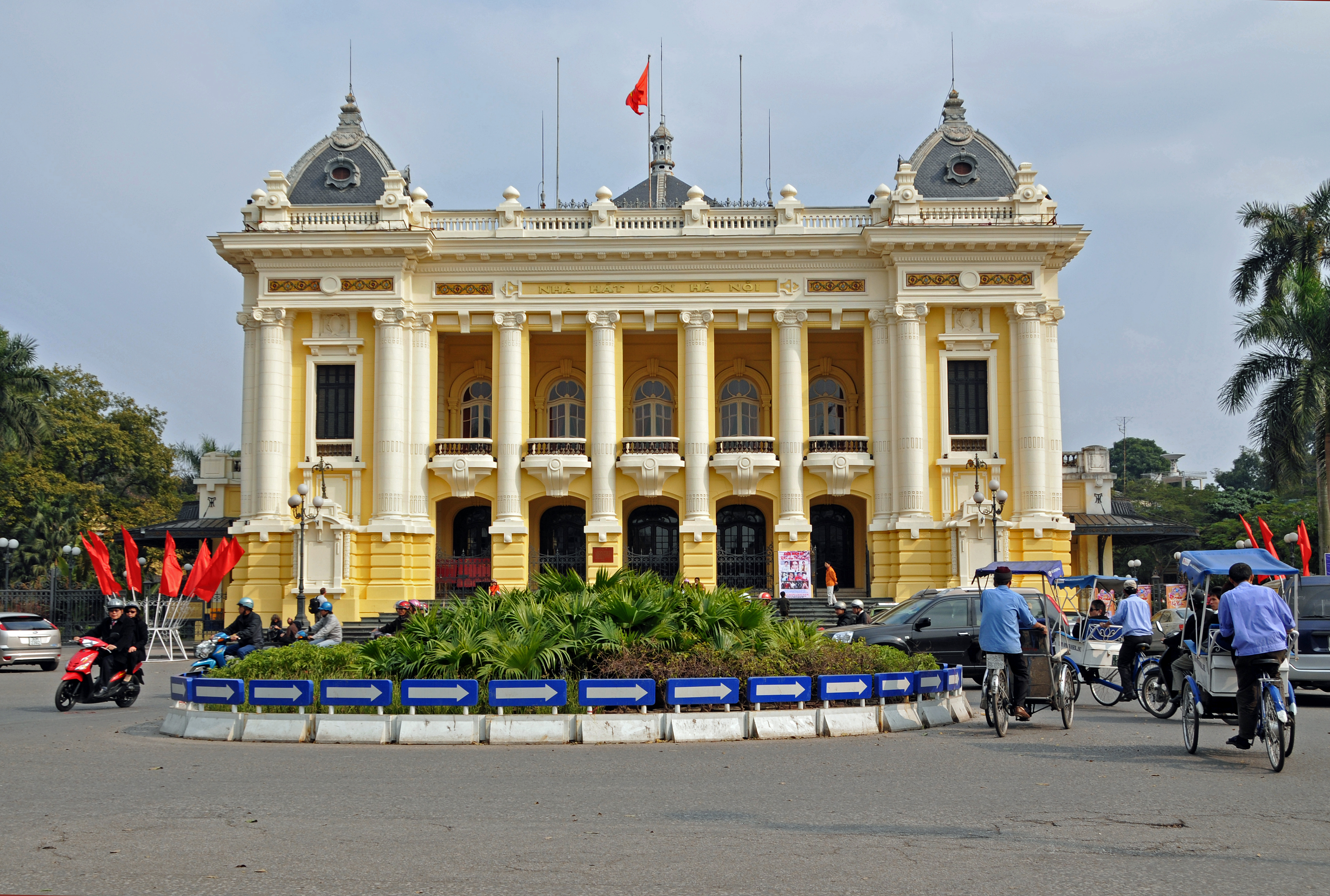 Hanoi Opera House